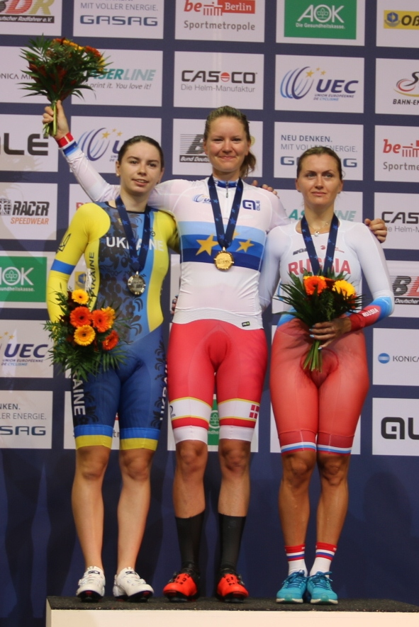 Podium Scratch, v.l.n.r.: Tatjana Klimschenko, Trine Schmidt, Evgenia Augustinas